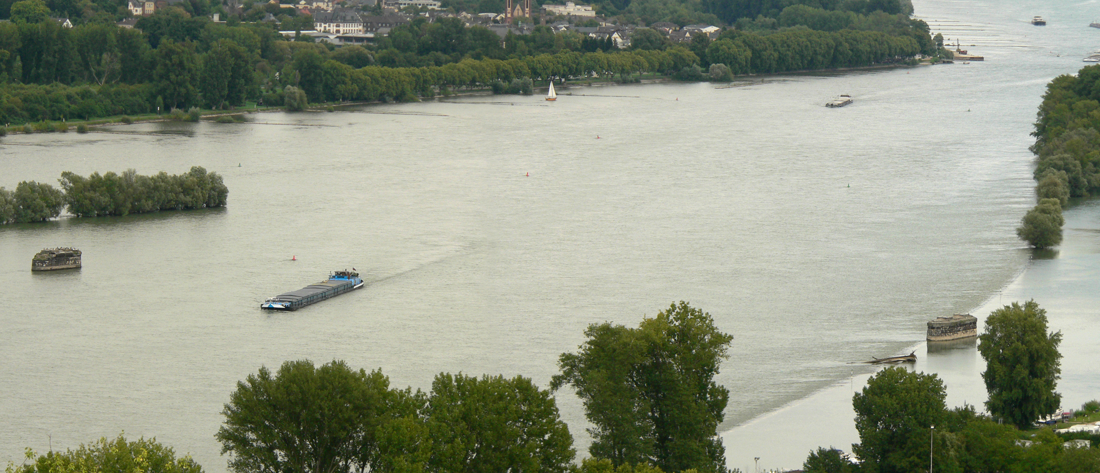 Pfeiler der Hindenburgbrücke vom Rochusberg gesehen